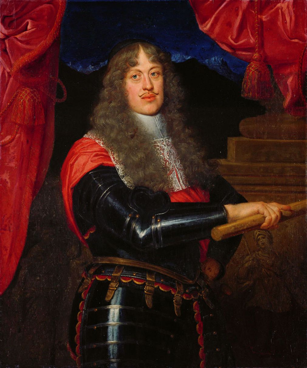 Kniestück